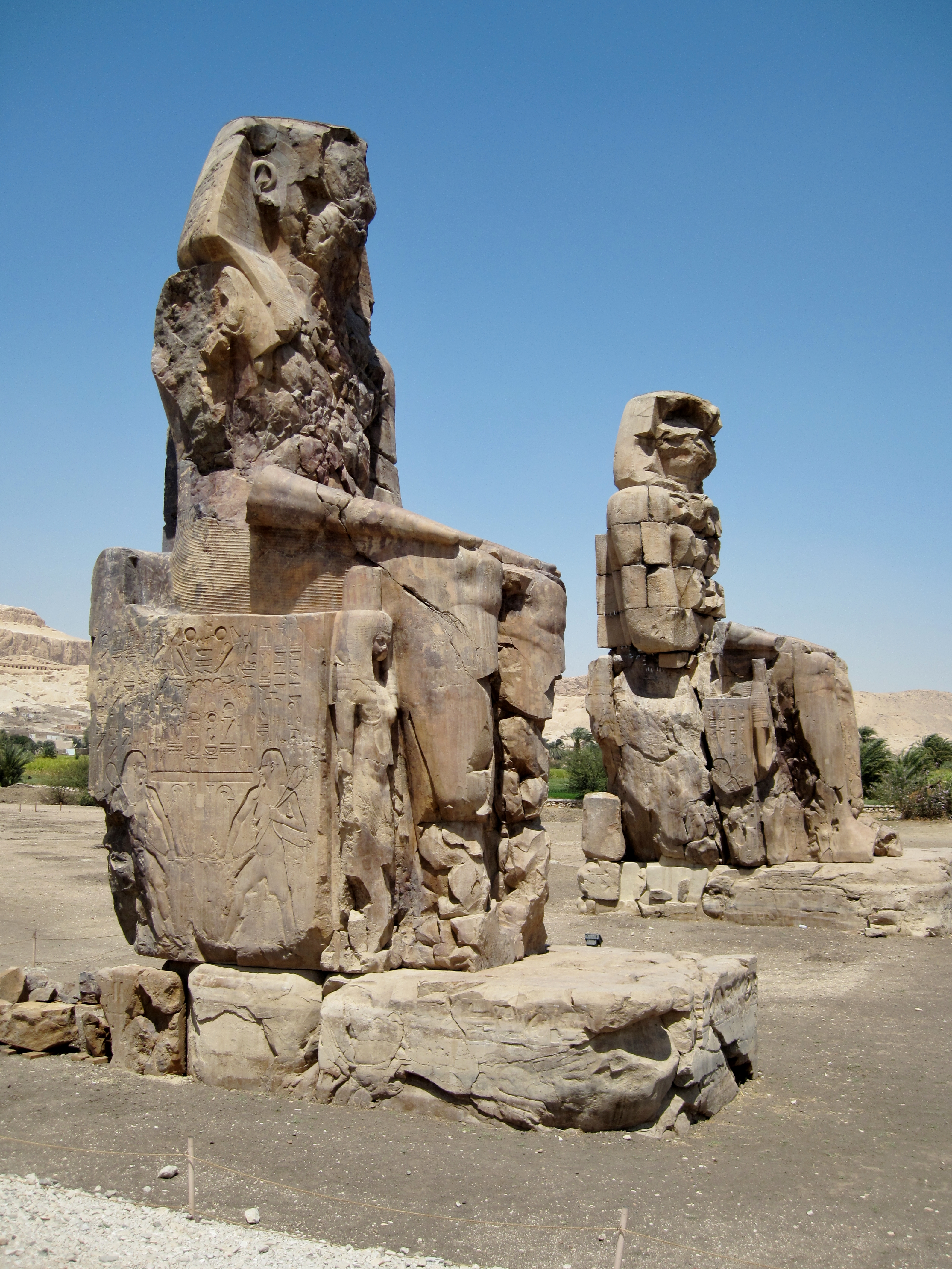 Die Memnonkolosse in Theben-West (bei Luxor), Ägypten